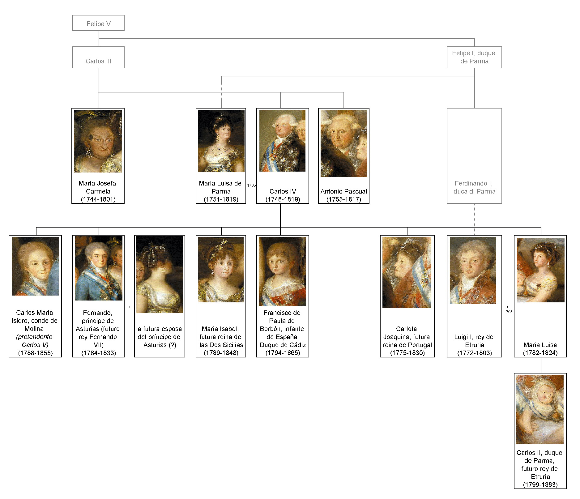 La familia de Carlos IV (Goya) family tree